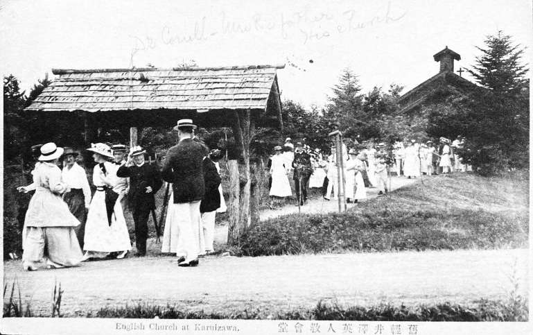 Karuizawa, Nagano, Japan, 1920s